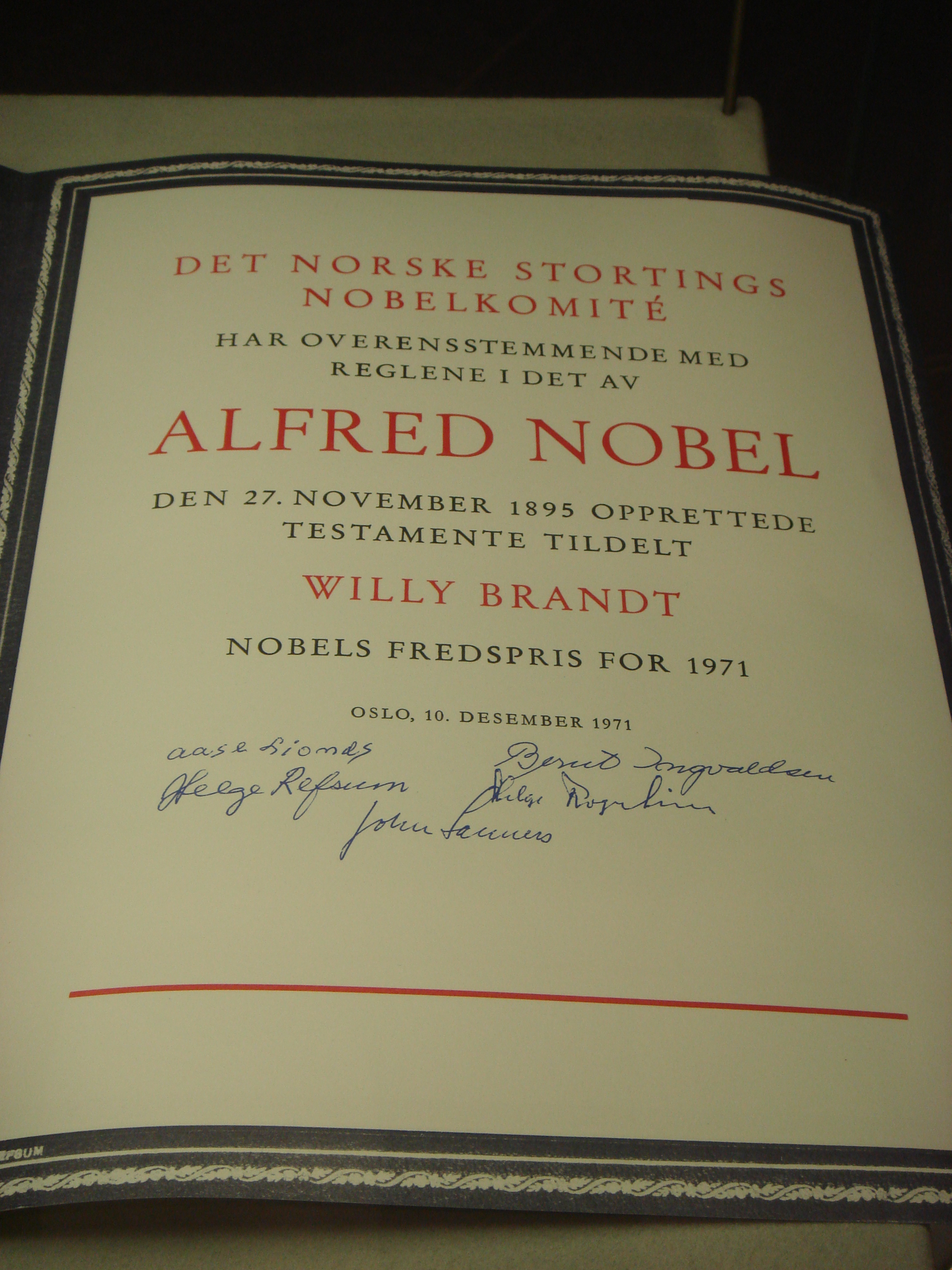 Nobelpreisurkunde Willy Brandt